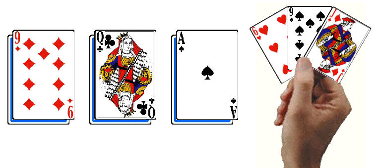 Begining of the 'Shithead' game